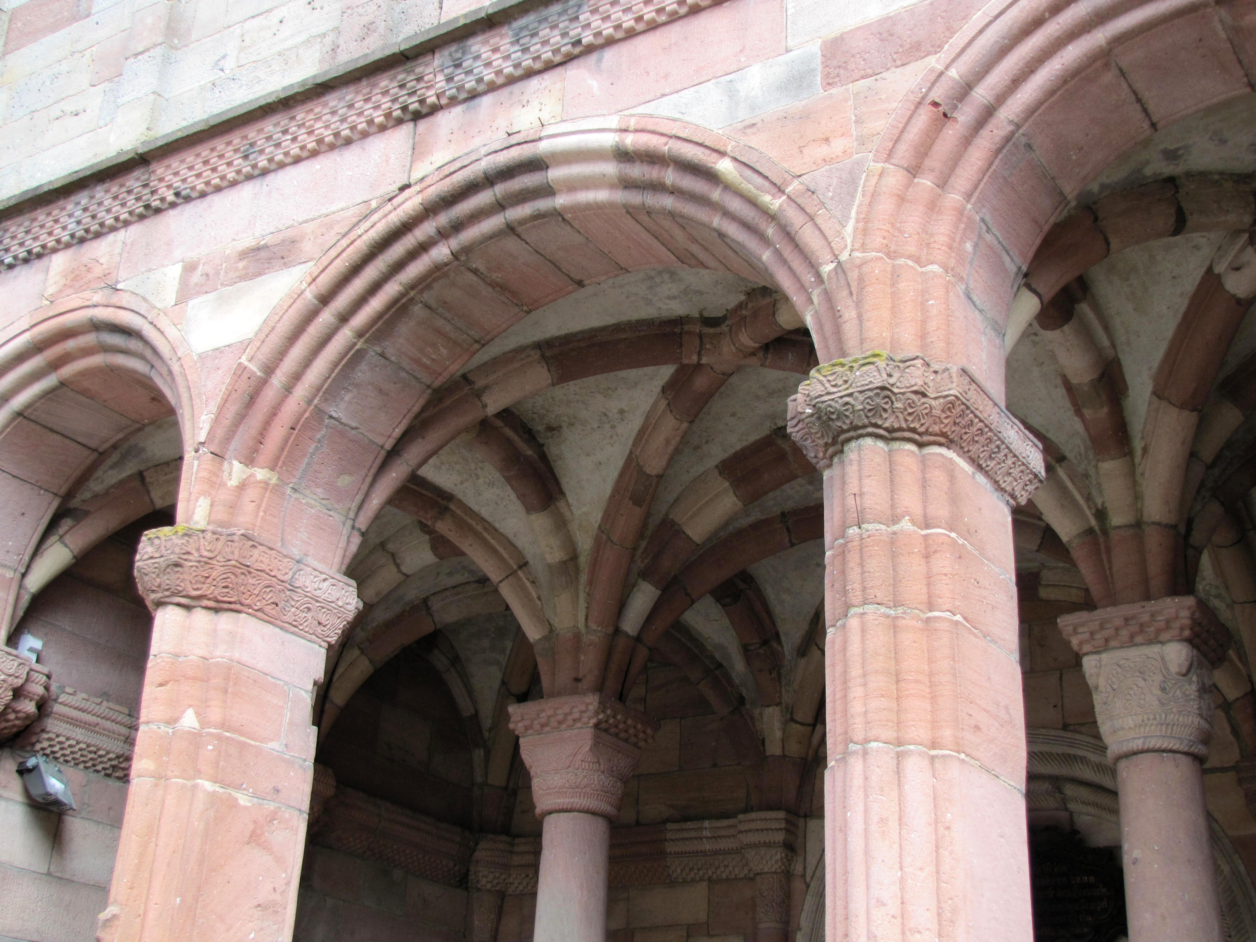 Alsace, Haut-Rhin, Collégiale Saints-Michel et Gangolphe de Lautenbach (PA00085503, IA00054819).